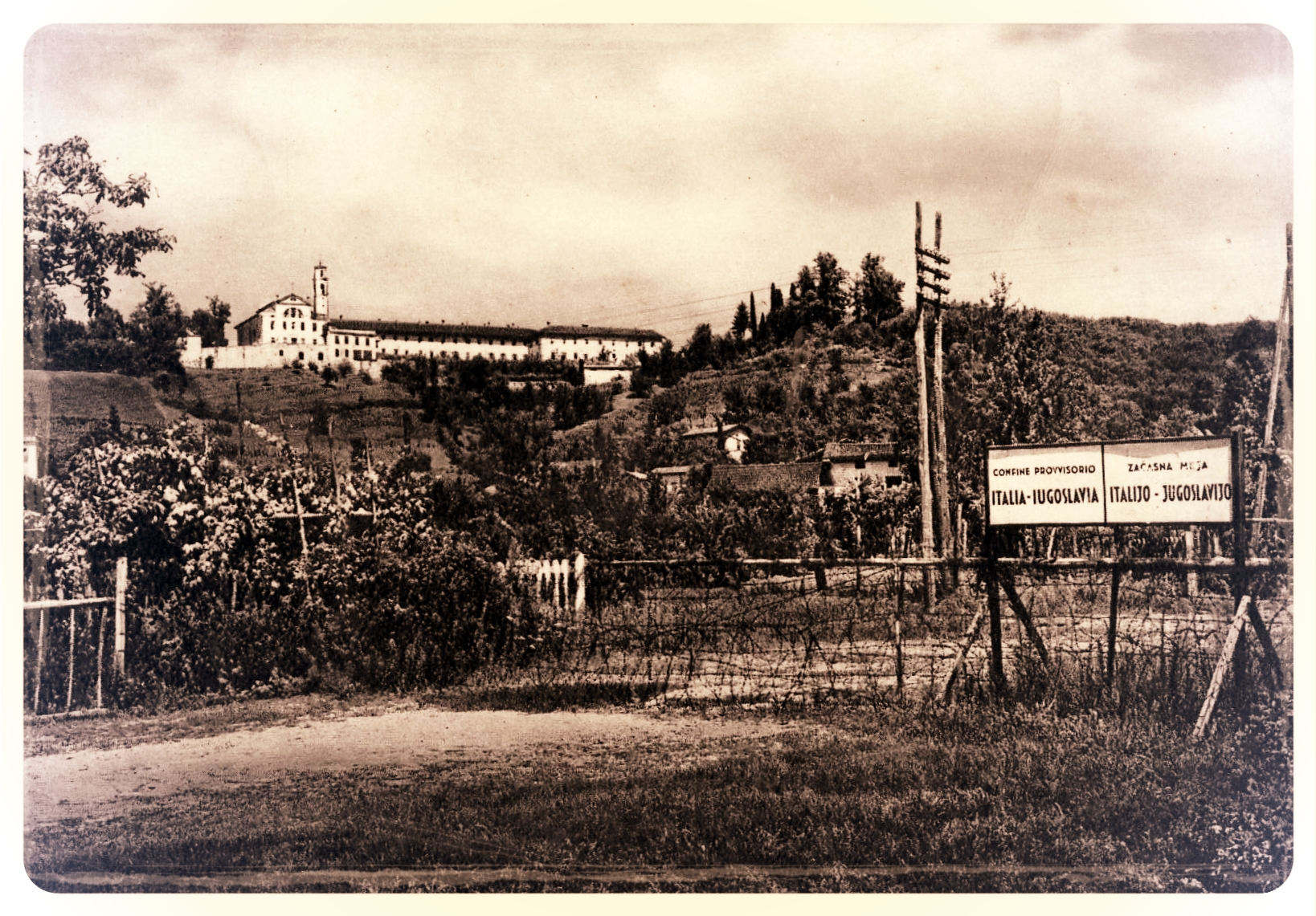 1945 : Začasna meja / Confine provisorio Italija / Italia - Jugoslavija / Iugoslavia